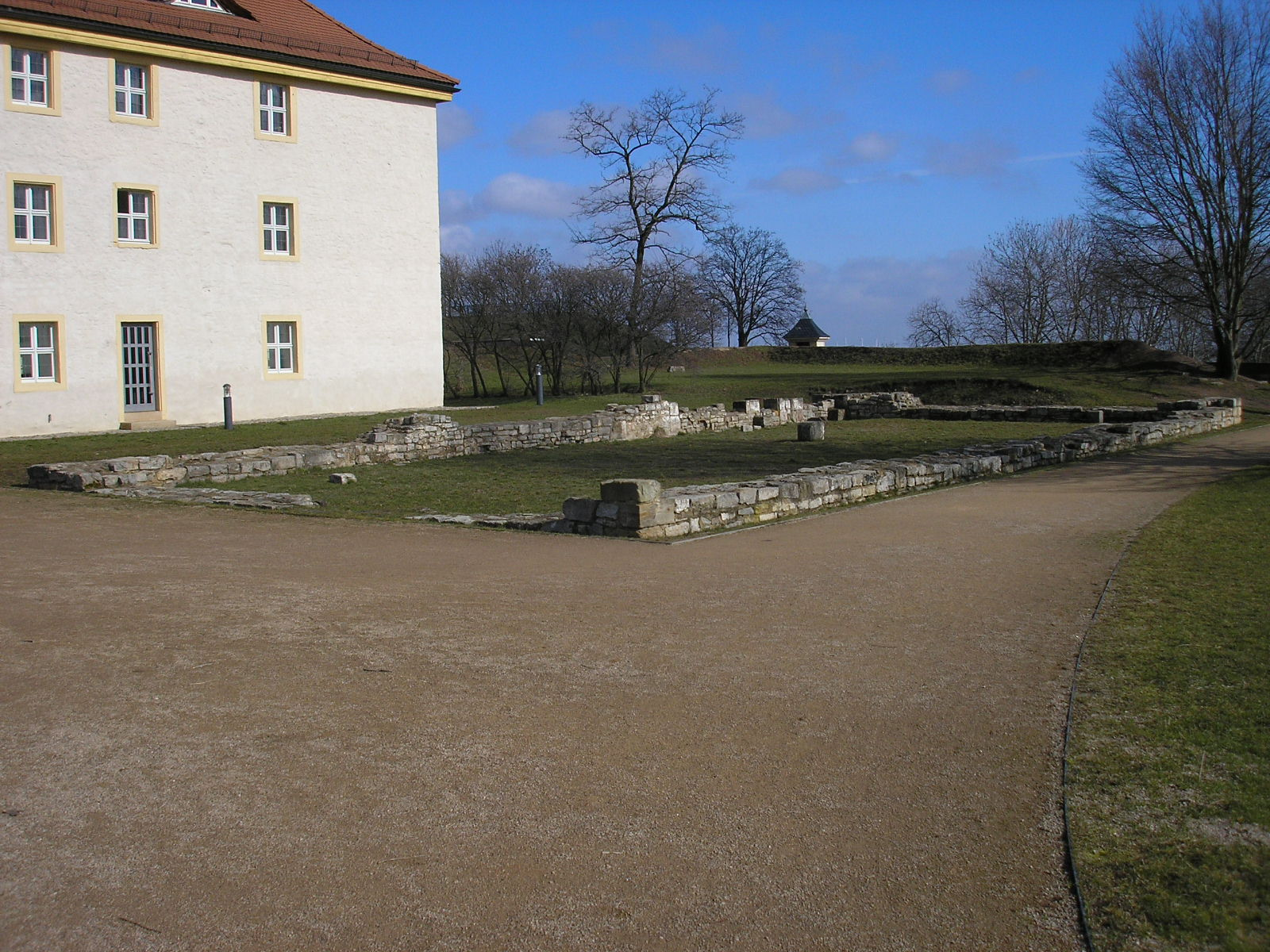 Das freigelegte Fundament der Leonhardskirche auf dem Petersberg in Erfurt (Thüringen).